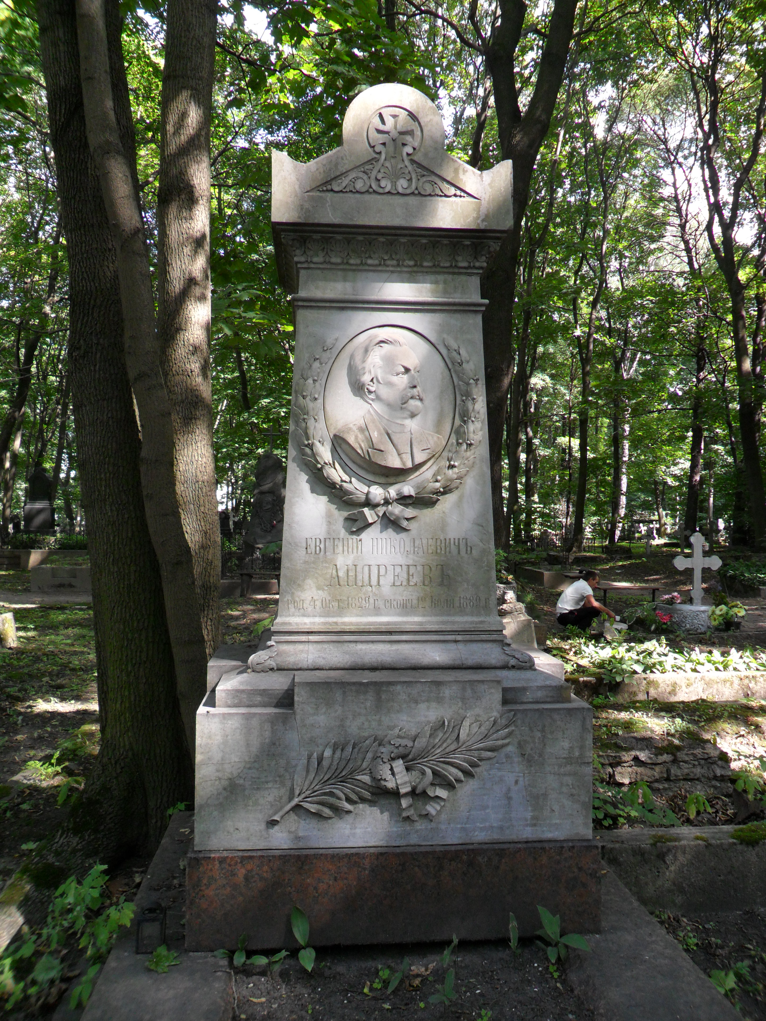 Могила российского педагога и публициста Евгения Николаевича Андреева на кладбище Новодевичьего монастыря в Санкт-Петербурге